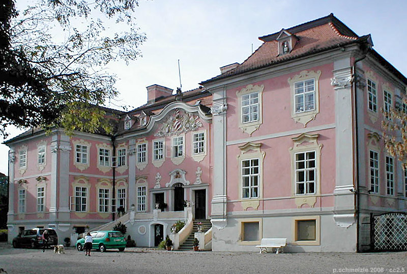 Schloss Assumstadt in Möckmühl-Züttlingen